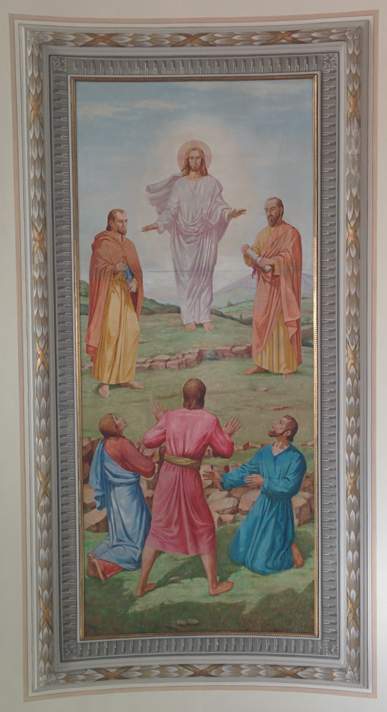 Affresco raffigurante la Trasfigurazione di Tabor, di Bruno Vedovato. Soffitto della chiesa parrocchiale di Cresole di Caldogno, provincia di Vicenza